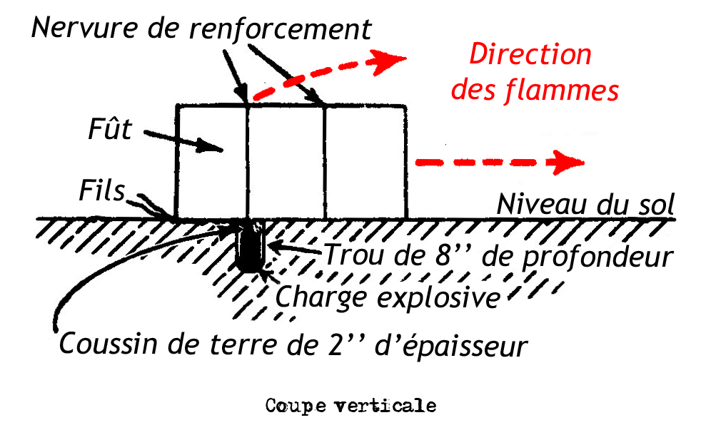 Traduction de Demigasse installation.jpg